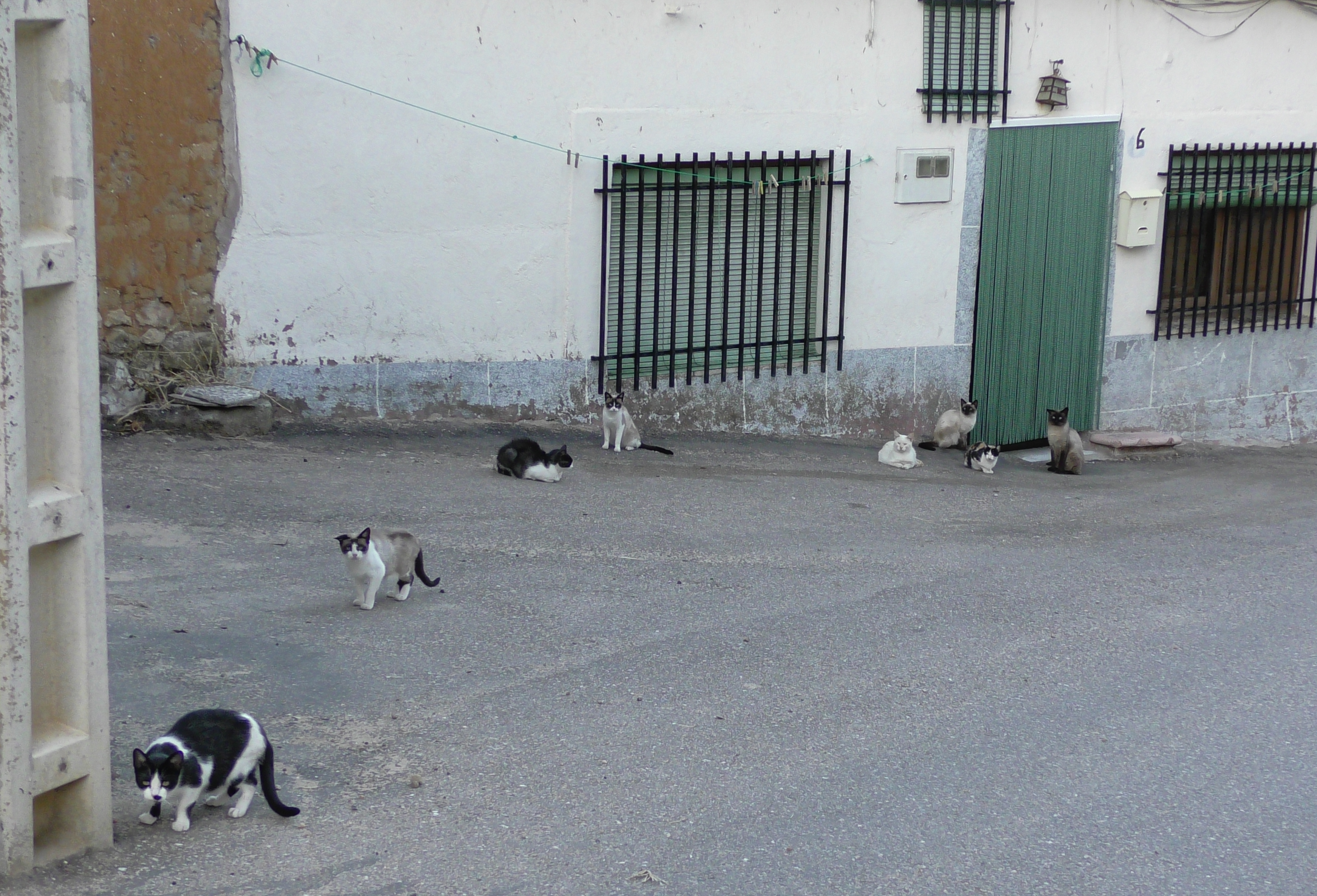 El Maderal